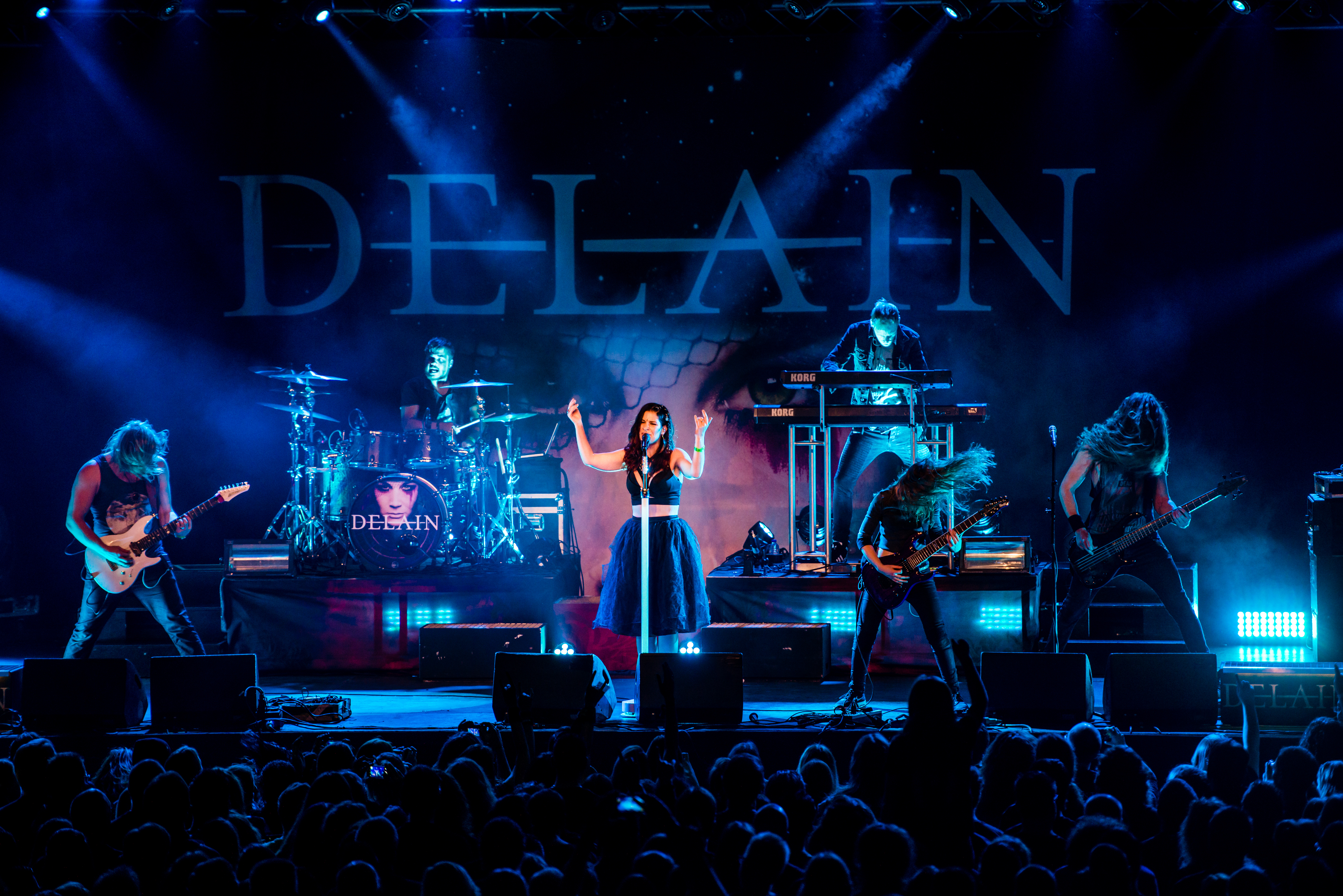 'Delain - Epic Metal Fest - Eindhoven'